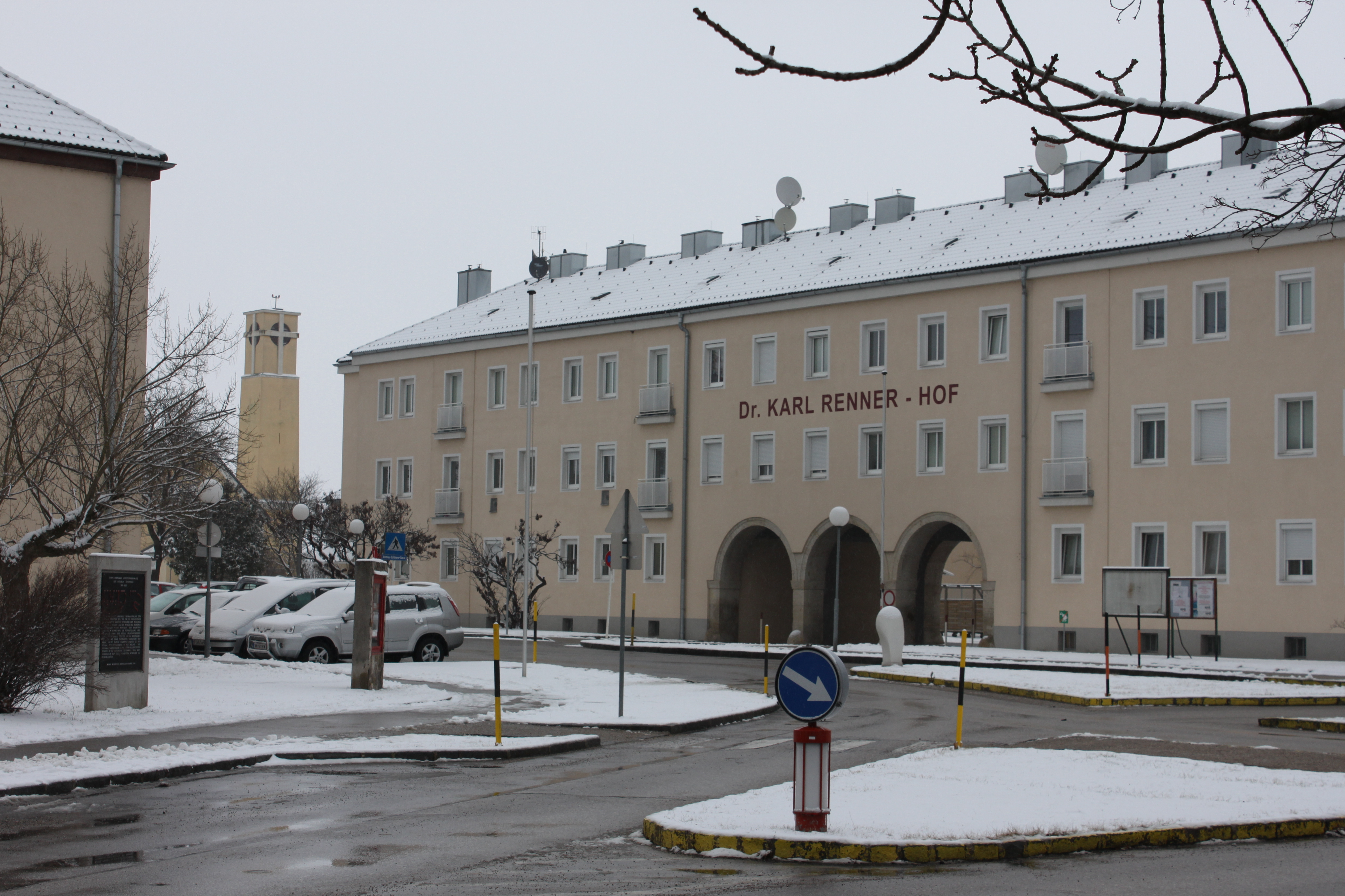 Dr.-Karl-Renner-Hof in Wiener Neustadt, im Hintergrund der Kirchturm von St. Anton am Flugfeld am Flugfeldgürtel, hier mündet die Fliegergasse in die Wöllersdorfer Straße